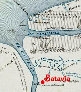 Leprozerie Batavia te Suriname op een plantagekaart door gouverneur C. van Rosevelt